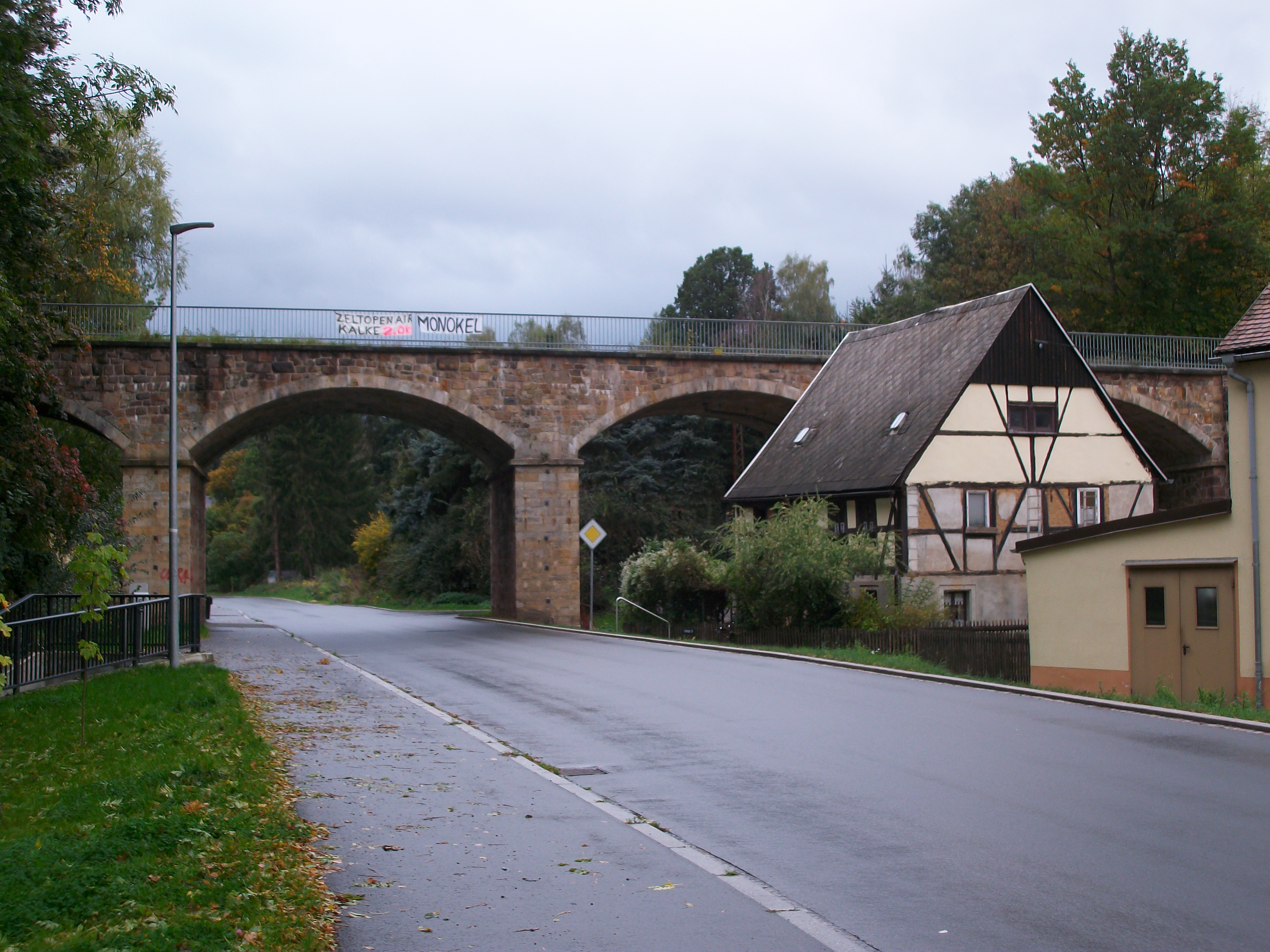 Denkmalgeschütztes Wohnhaus Mittweidaer Straße 60 sowie Eisenbahnviadukt der Bahnstrecke Roßwein–Niederwiesa in Hainichen